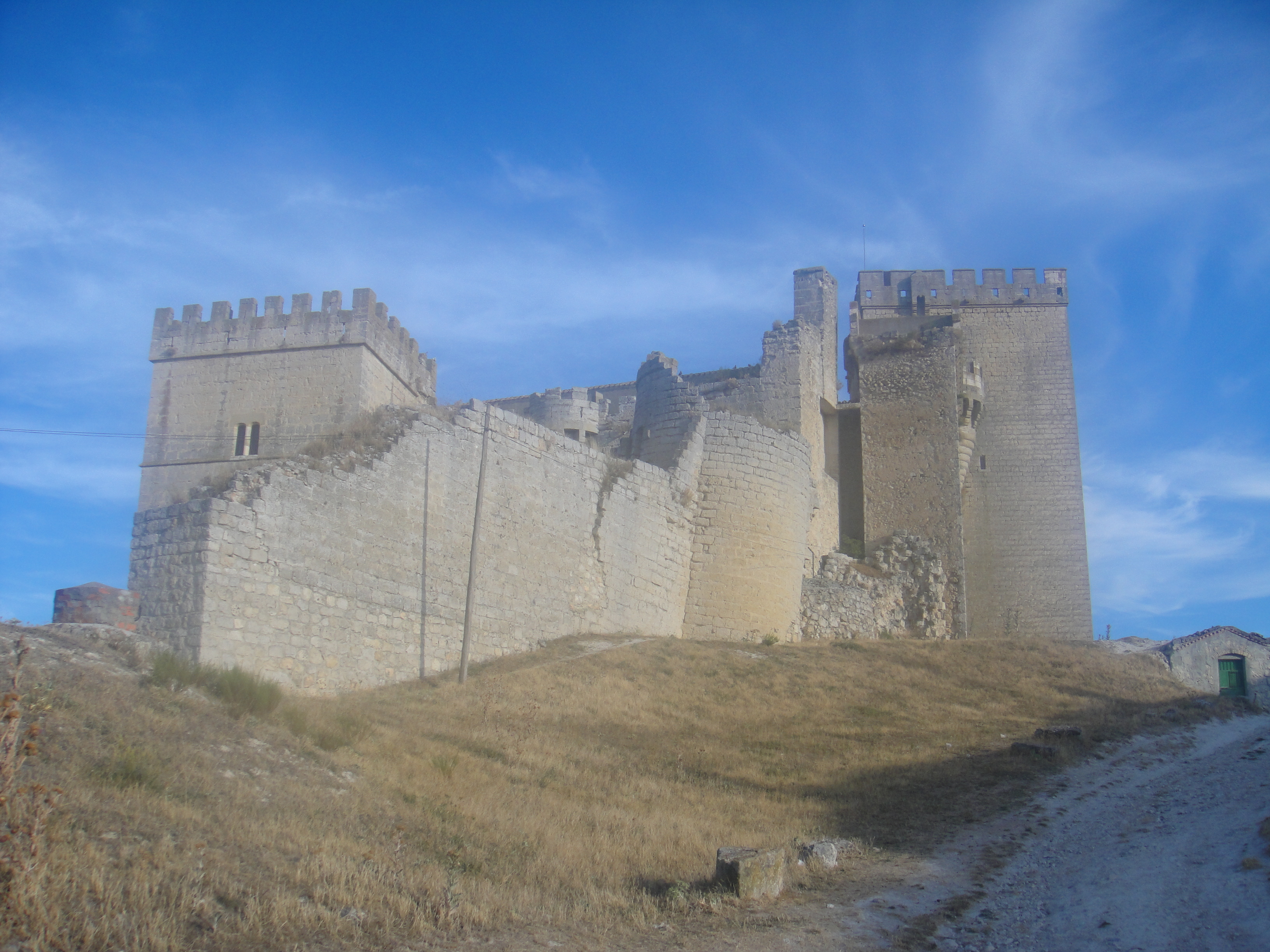 Exterior del castillo de Ampudia, provincia de Palencia, (España).